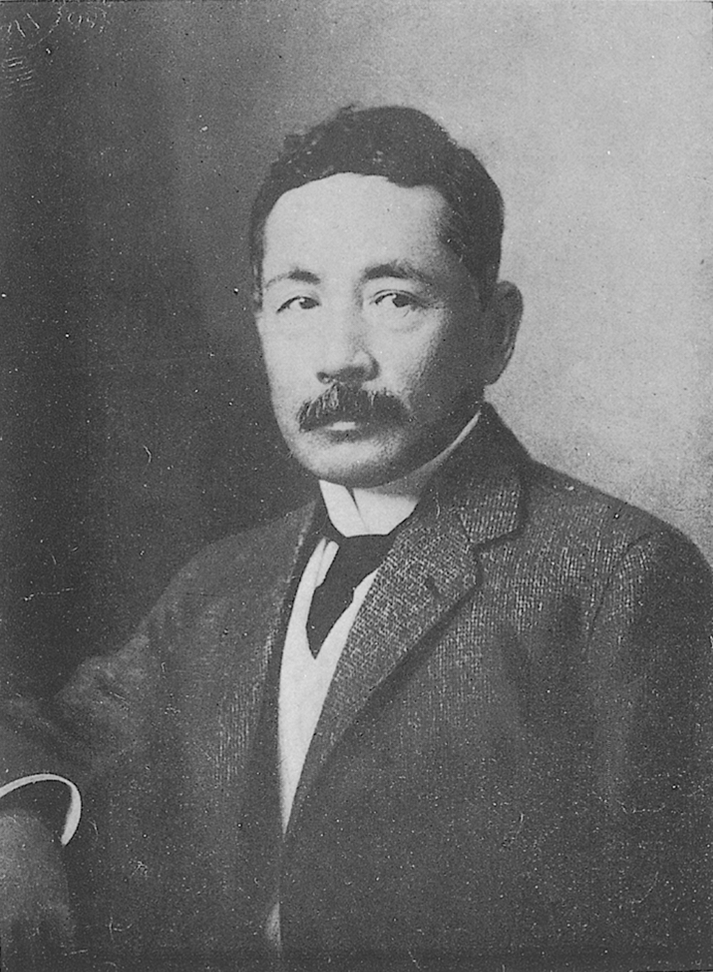 Portrait of Natsume Soseki (夏目漱石, 1867 – 1916)